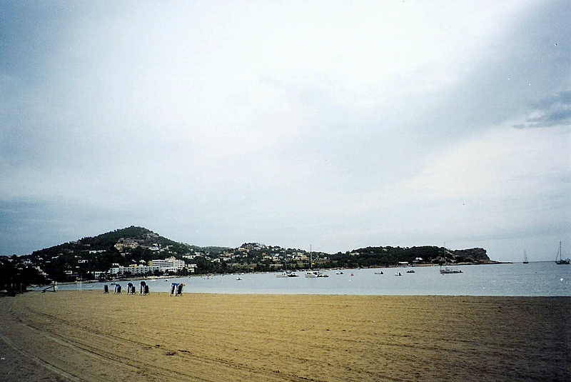 Vista de llevant des de la platja de Talamanca, a Eivissa